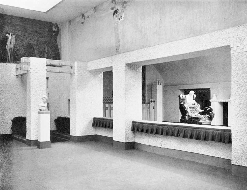 XIV. Ausstellung 1902, Blick aus dem linken Seitenschiff auf die Beethovenstatue im Hauptraum, Foto: Archiv der Secession